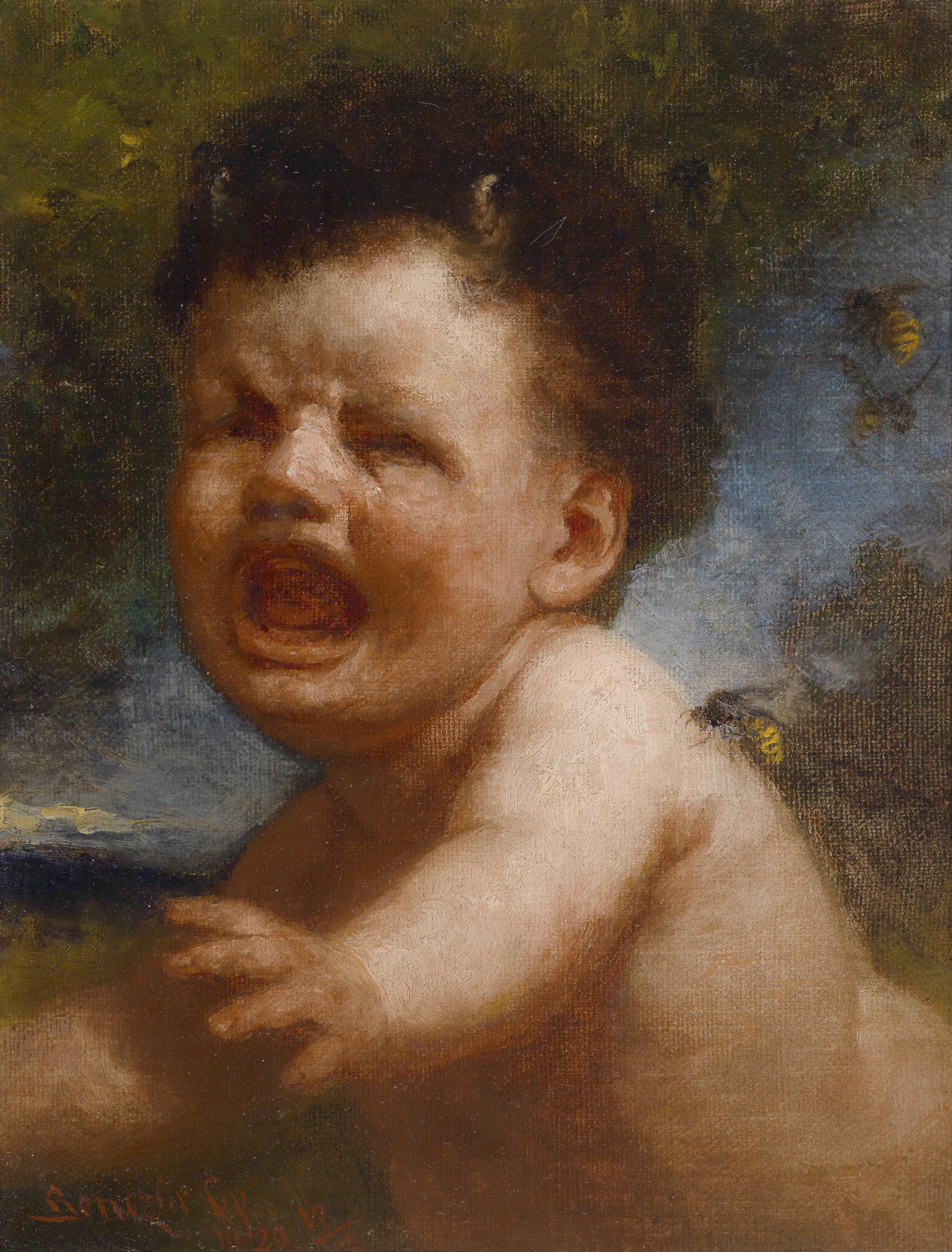 Amor mit Wespe, signiert, datiert Benczur Gyula 1920, Öl auf Leinwand, 38,5 x 29,5 cm